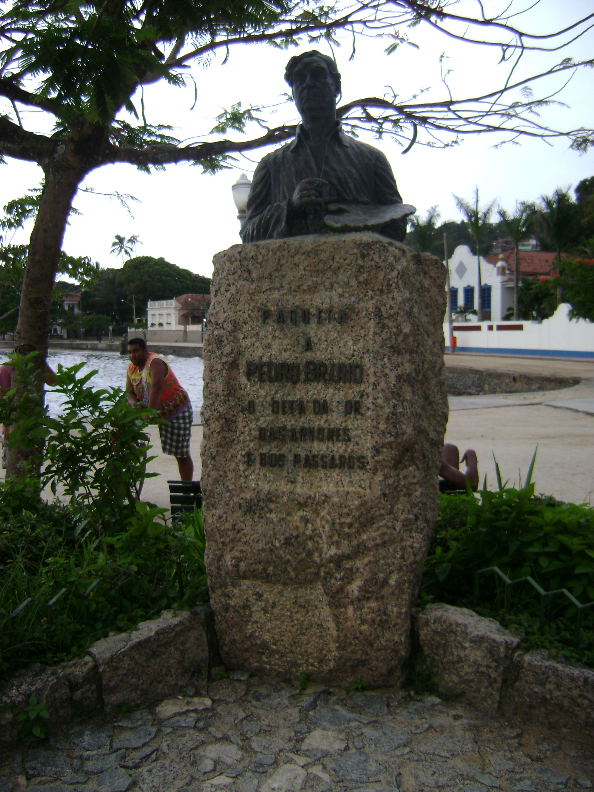 Estátua de Pedro Bruno, na ilha de Paquetá, na cidade de Rio de Janeiro, Brasil.